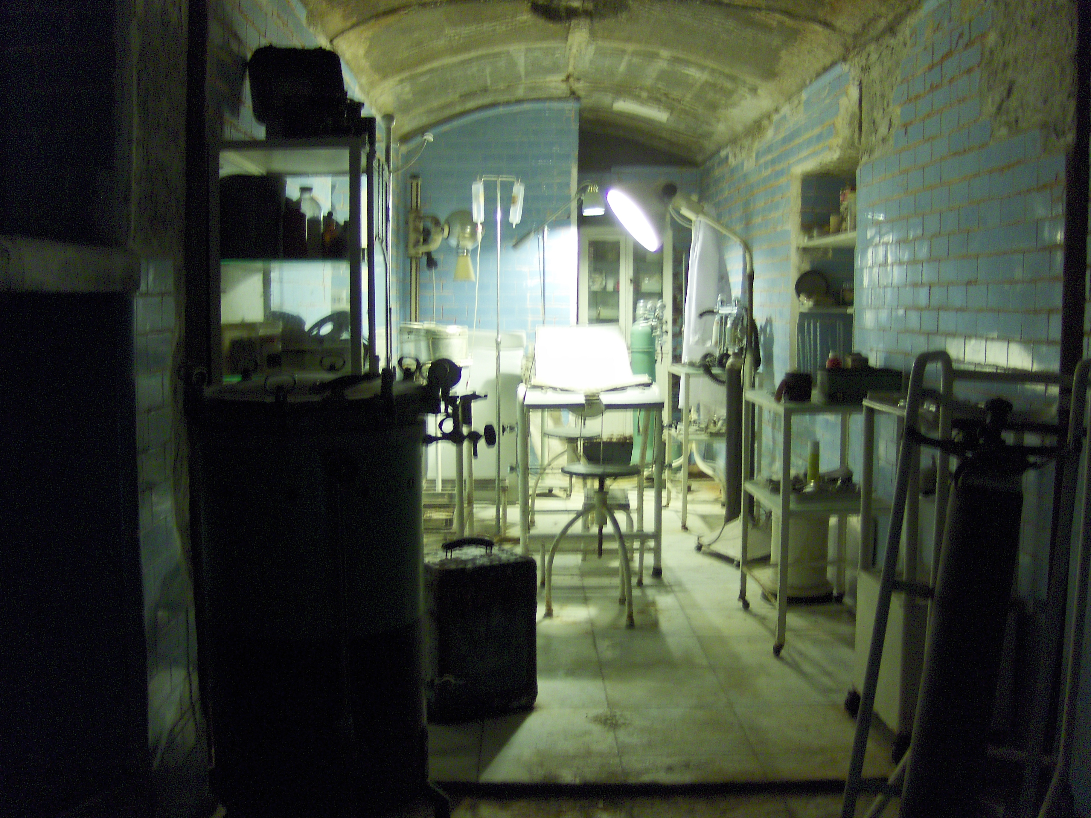 Quirófano en los refúgios antiaéreos de Almería